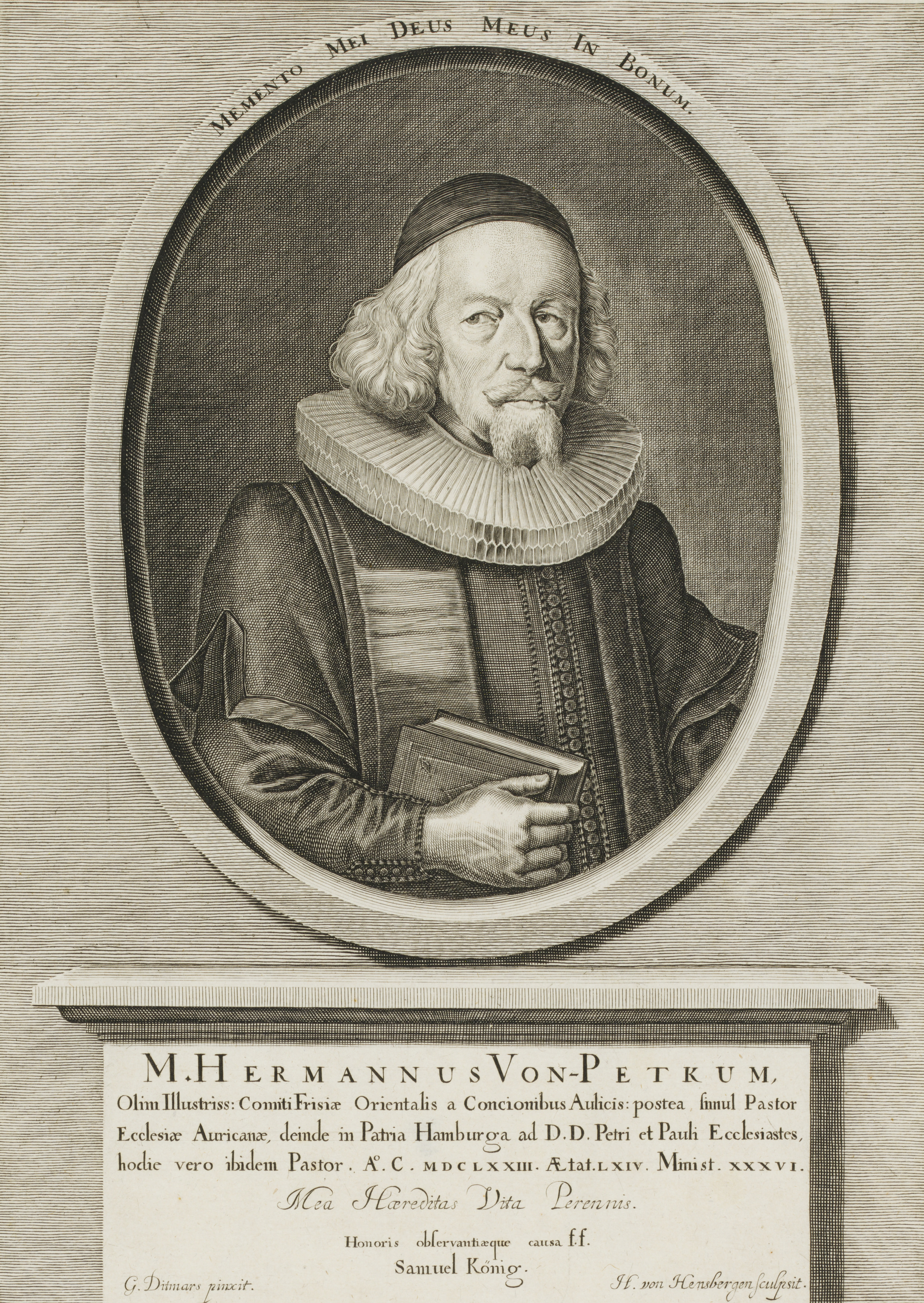 Bildnis von Hermann von Pettkum